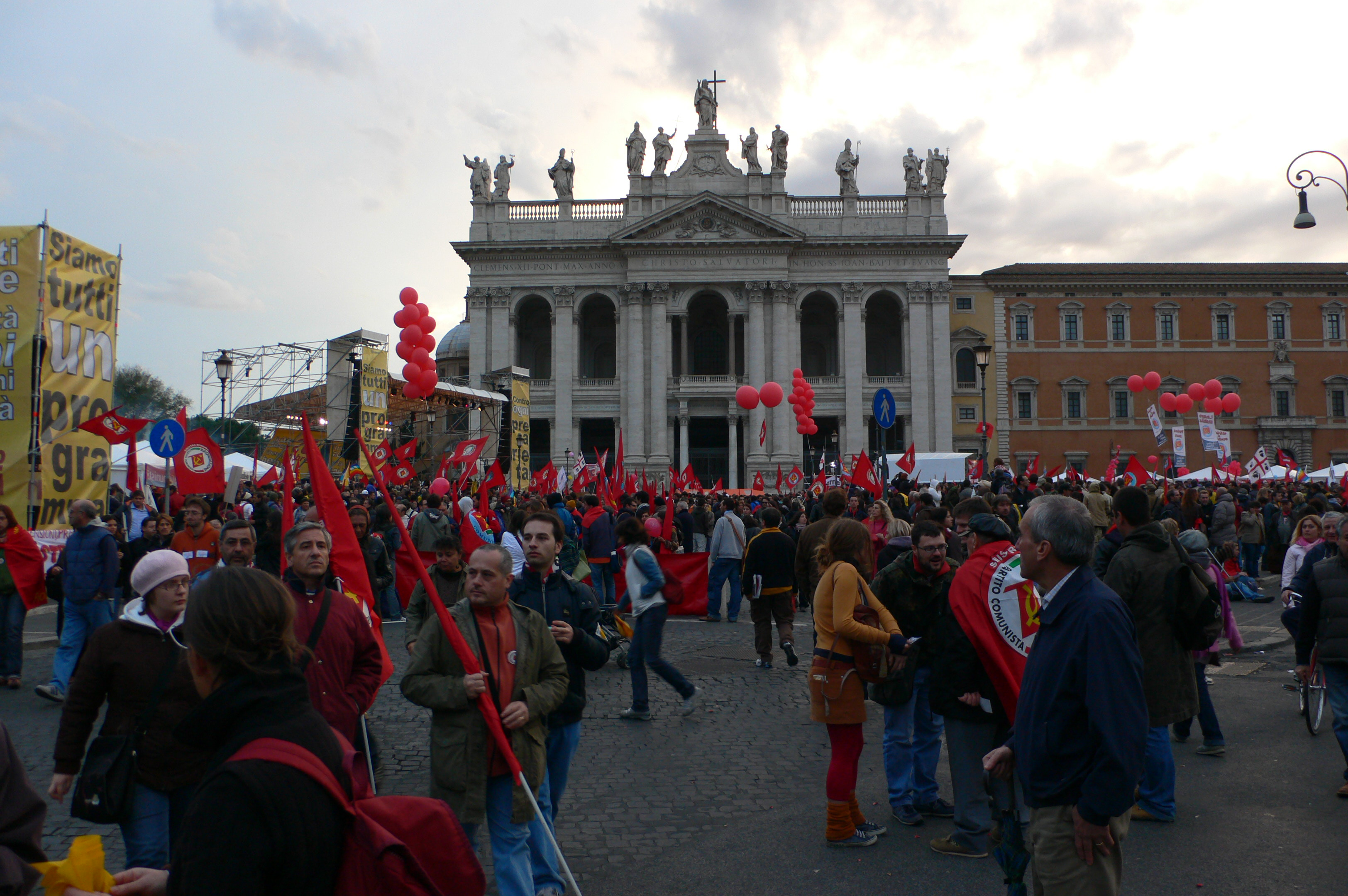 Manifestazione della Rifondazione Communista, Ott 20, 2007, 1 Milione di persone, Basilica di San Giovanni